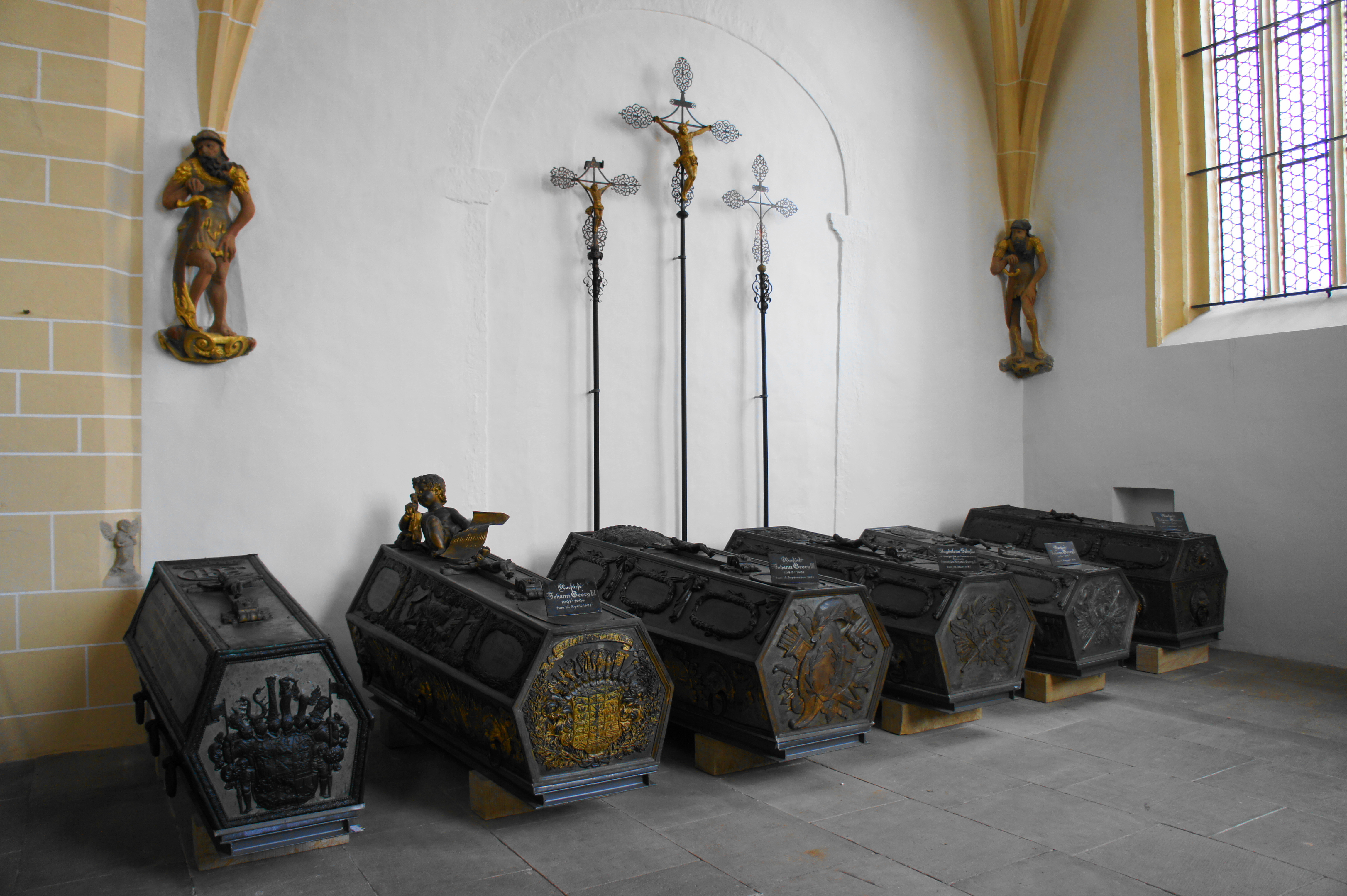 Der Dom zu Freiberg; Nordkapelle